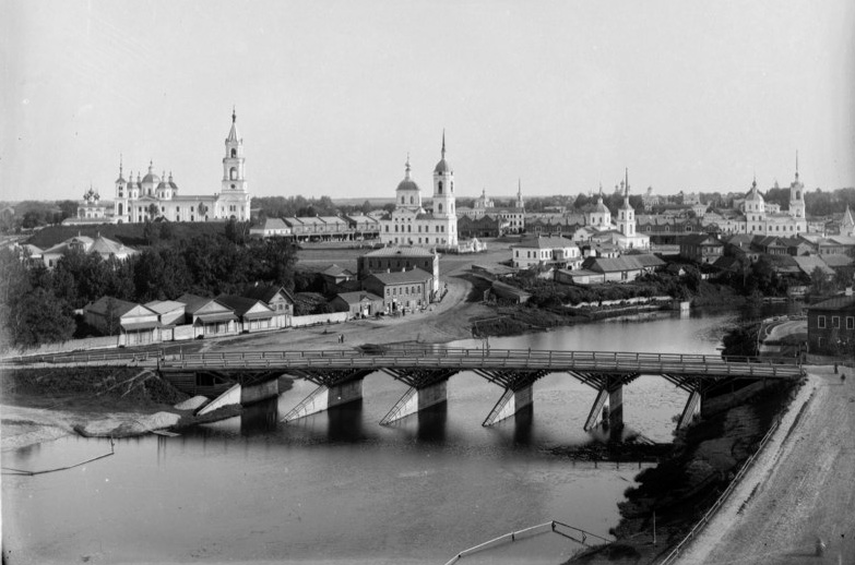 Market Square in Kashin